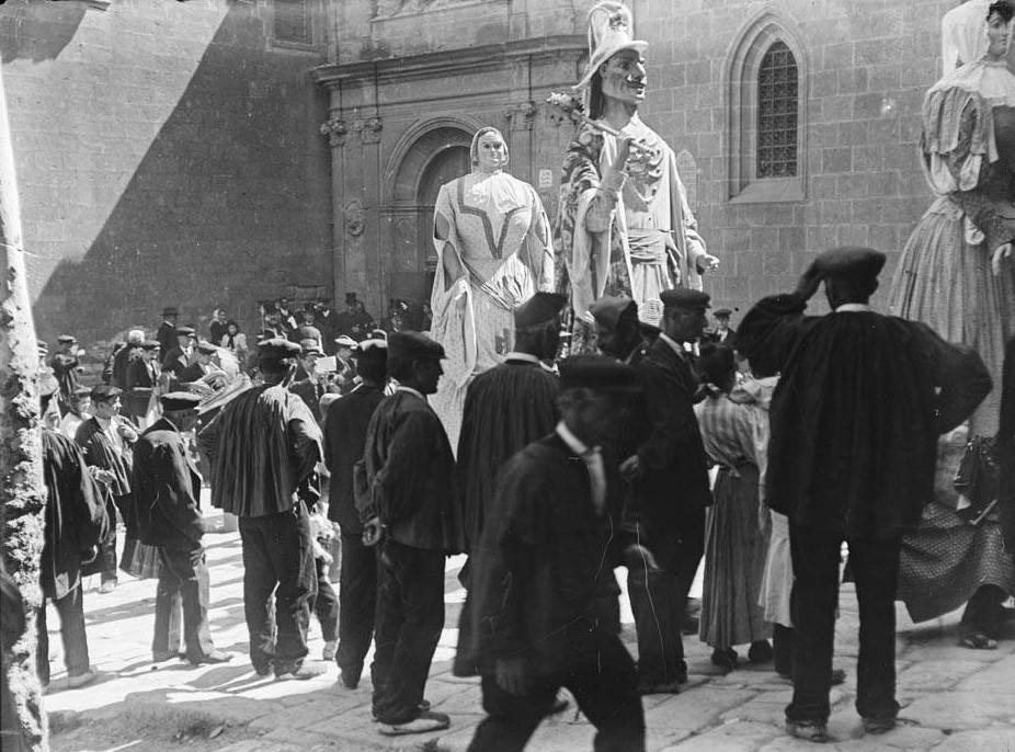 Imatge